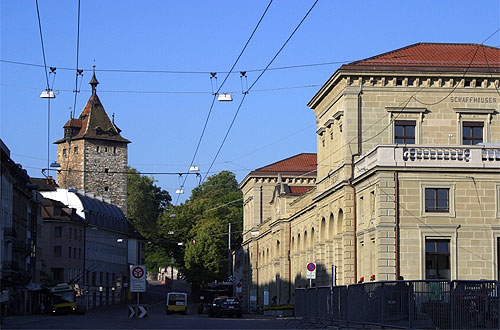 Schaffhausen: Obertor und Bahnhof (Nr. 03.1-5214)